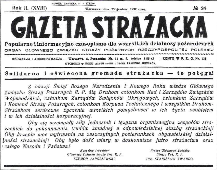 domena publiczna